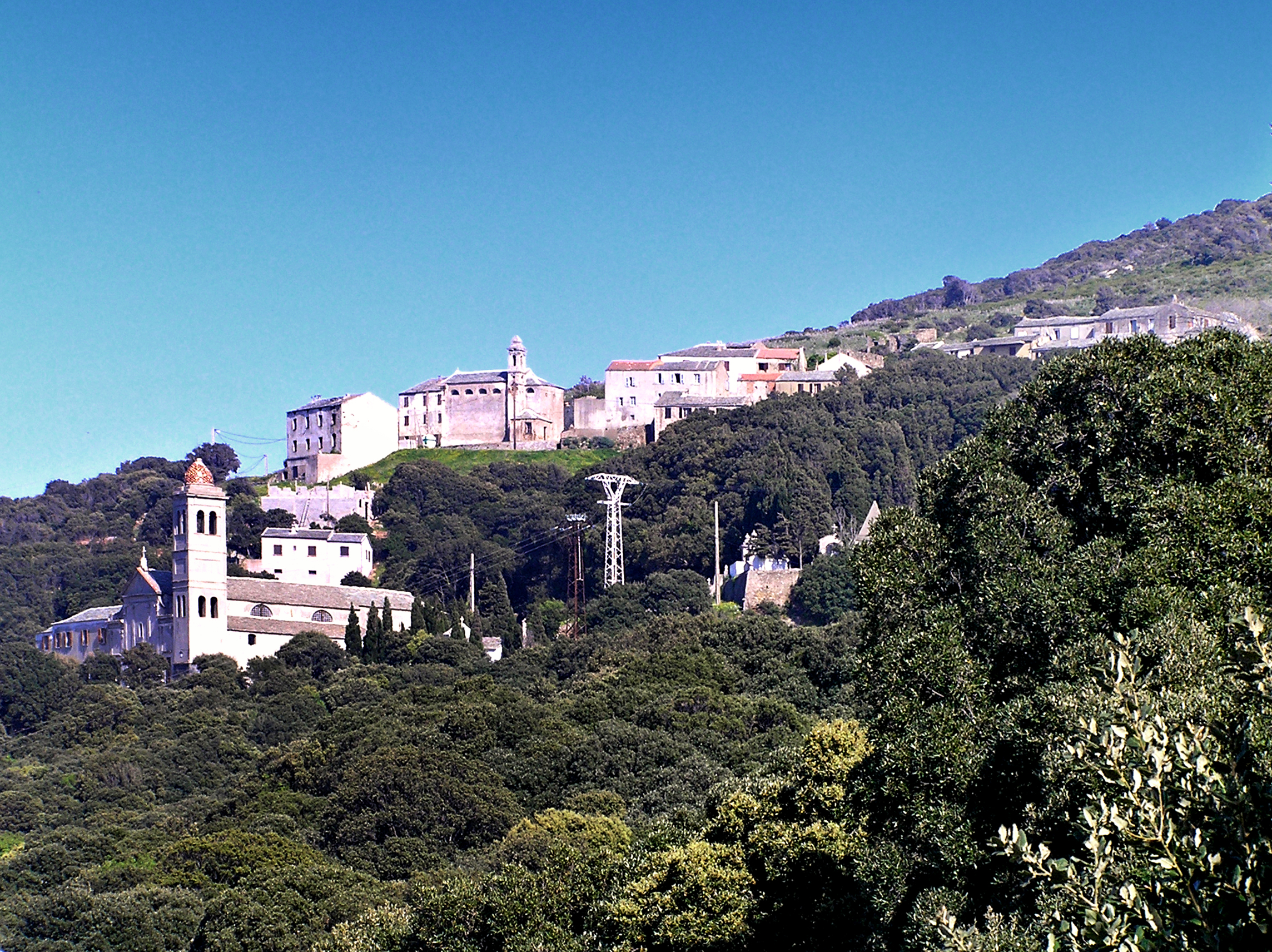 Ersa (Corsica) - Botticella, village dominant Conventu